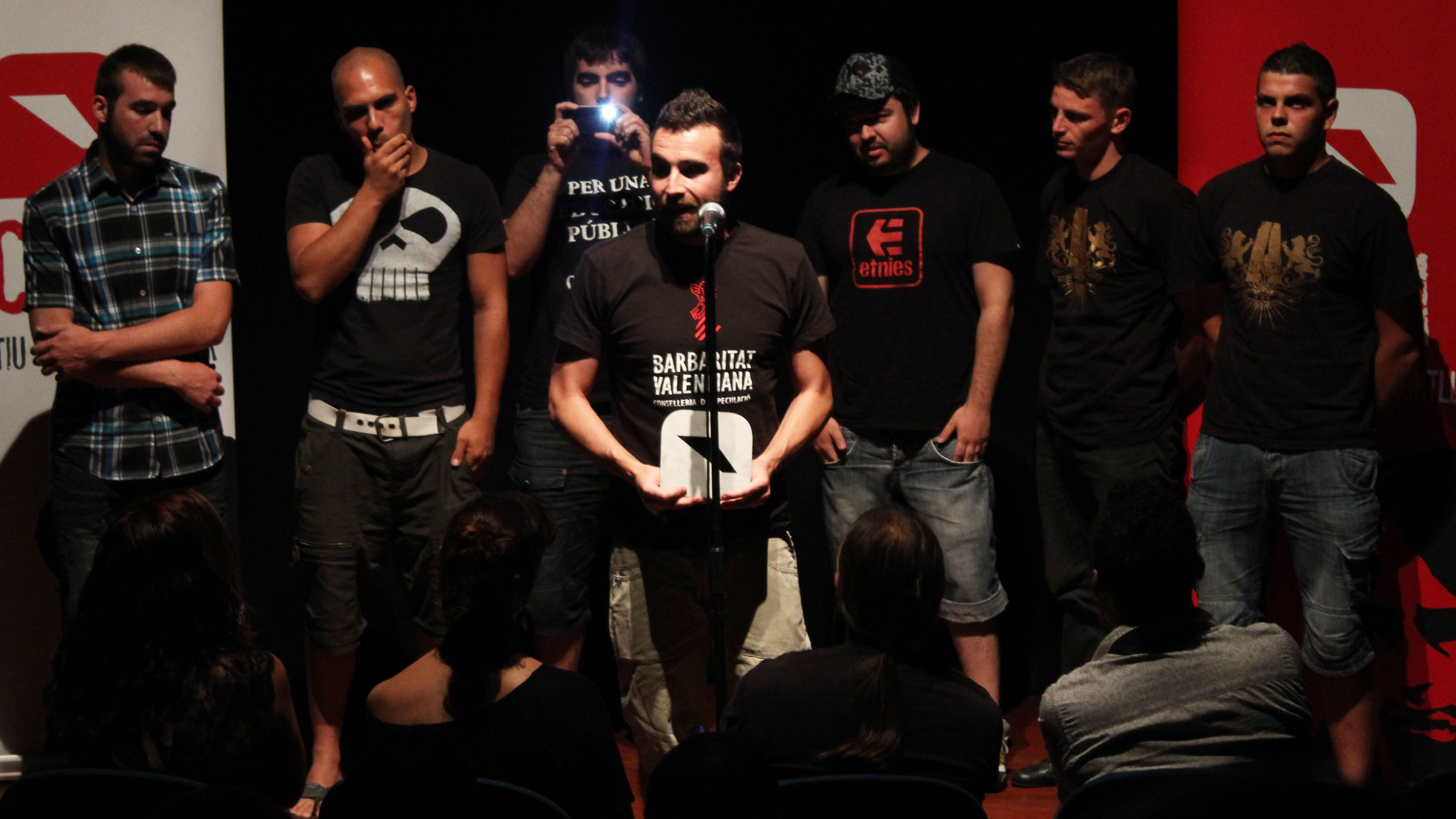 Premis 2012 del Col·lectiu Ovidi Montllor de Músics i Cantants en Valencià. Teatre El Micalet (València) 29 de juny de 2012